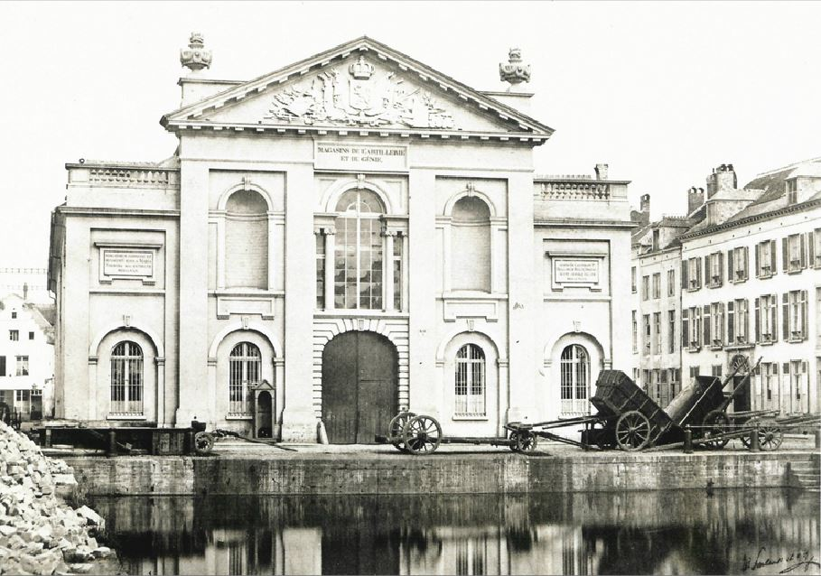 Edmond Fierlants, Premier Entrepôt, AVB J-1337